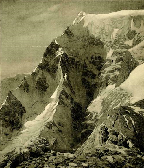 anlässlich der Überschreitung des Ortlermassivs am 5. August 1903 durch Gustav Jahn und Otto Laubheimer.